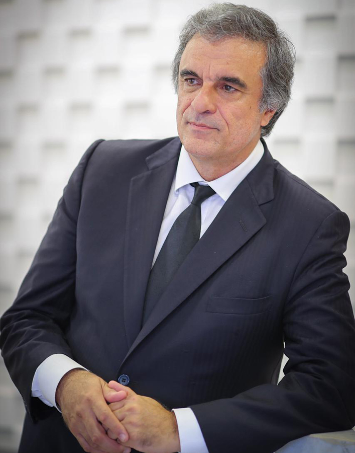 Jose eduardo cardozo 2018